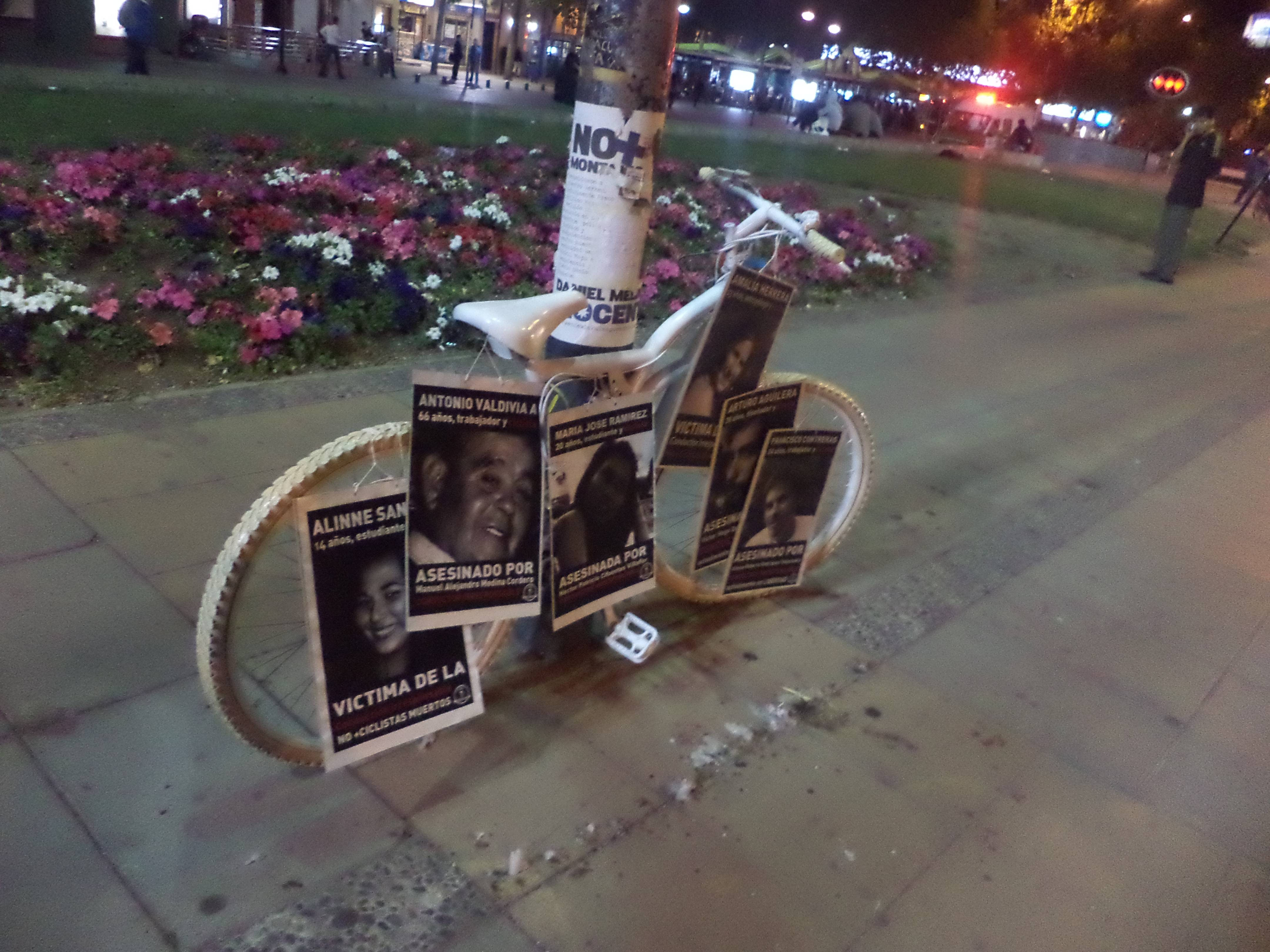 Bicianimitas. Fotos con ciclistas fallecidos en accidentes automovilísticos.